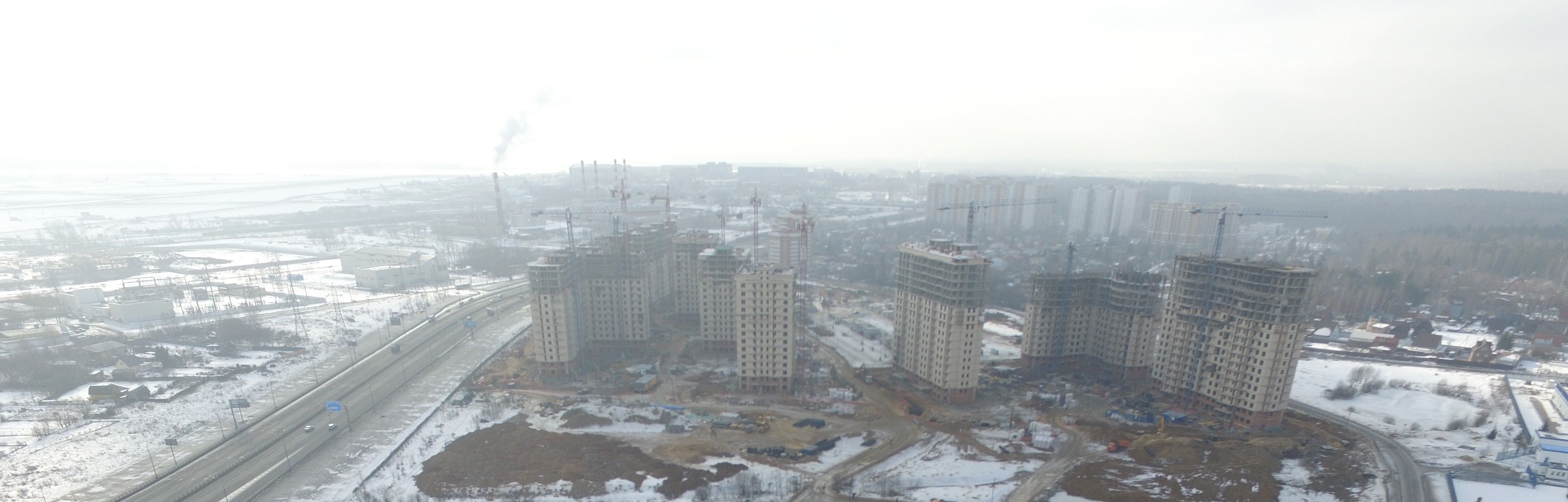 Строительство ЖК Внуково 2016. Первая очередь. Дома 1-9